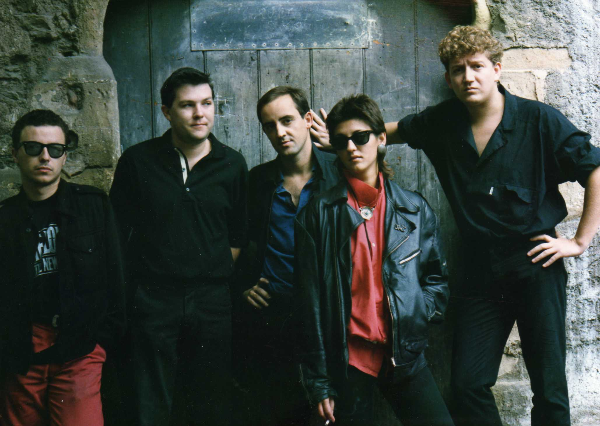 Detectors, grup de Rock Català